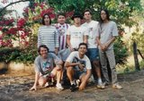 Maskavo Roots em 1995 na Chácara do Marrara.